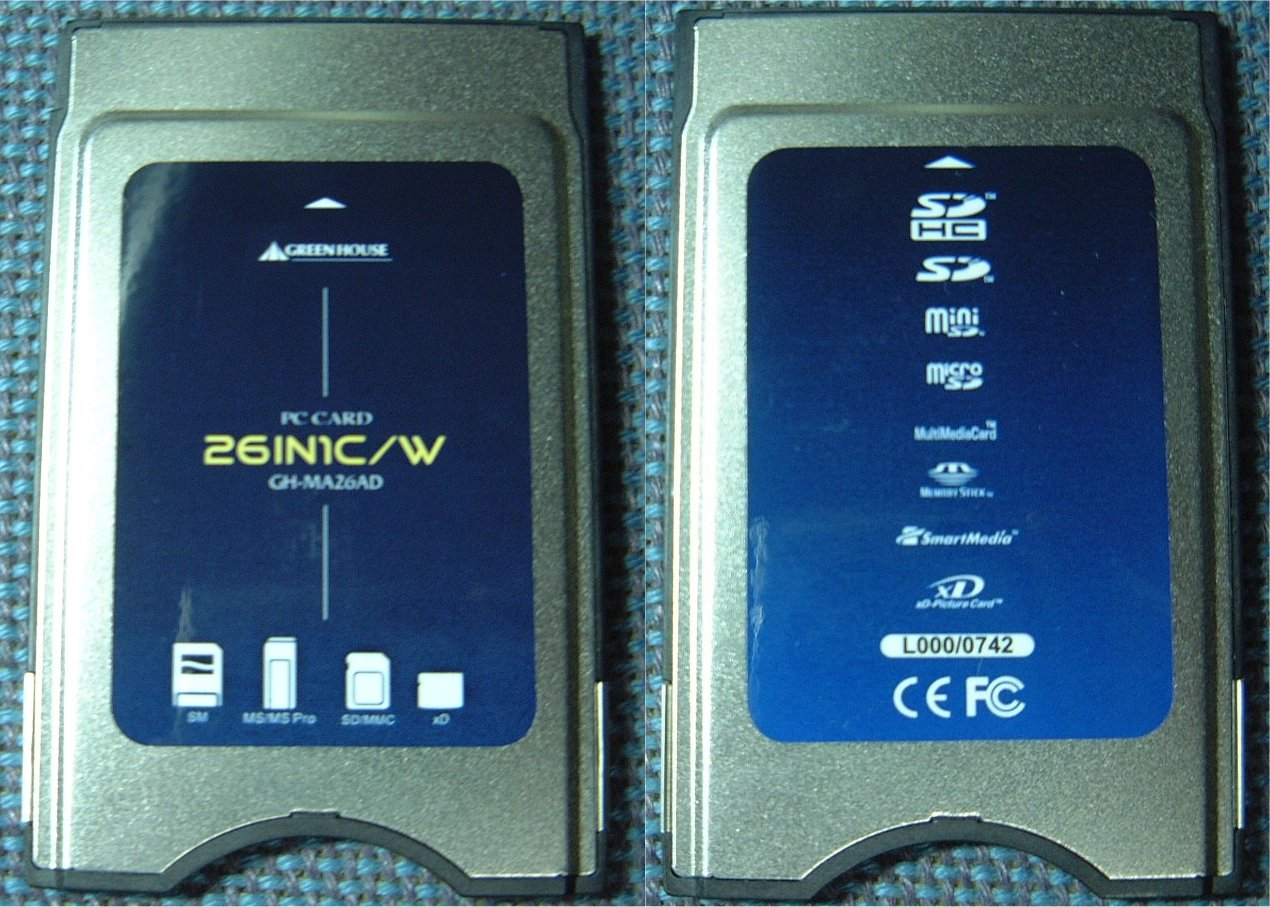 26種類のメモリーカードに対応したPCカードアダプタ